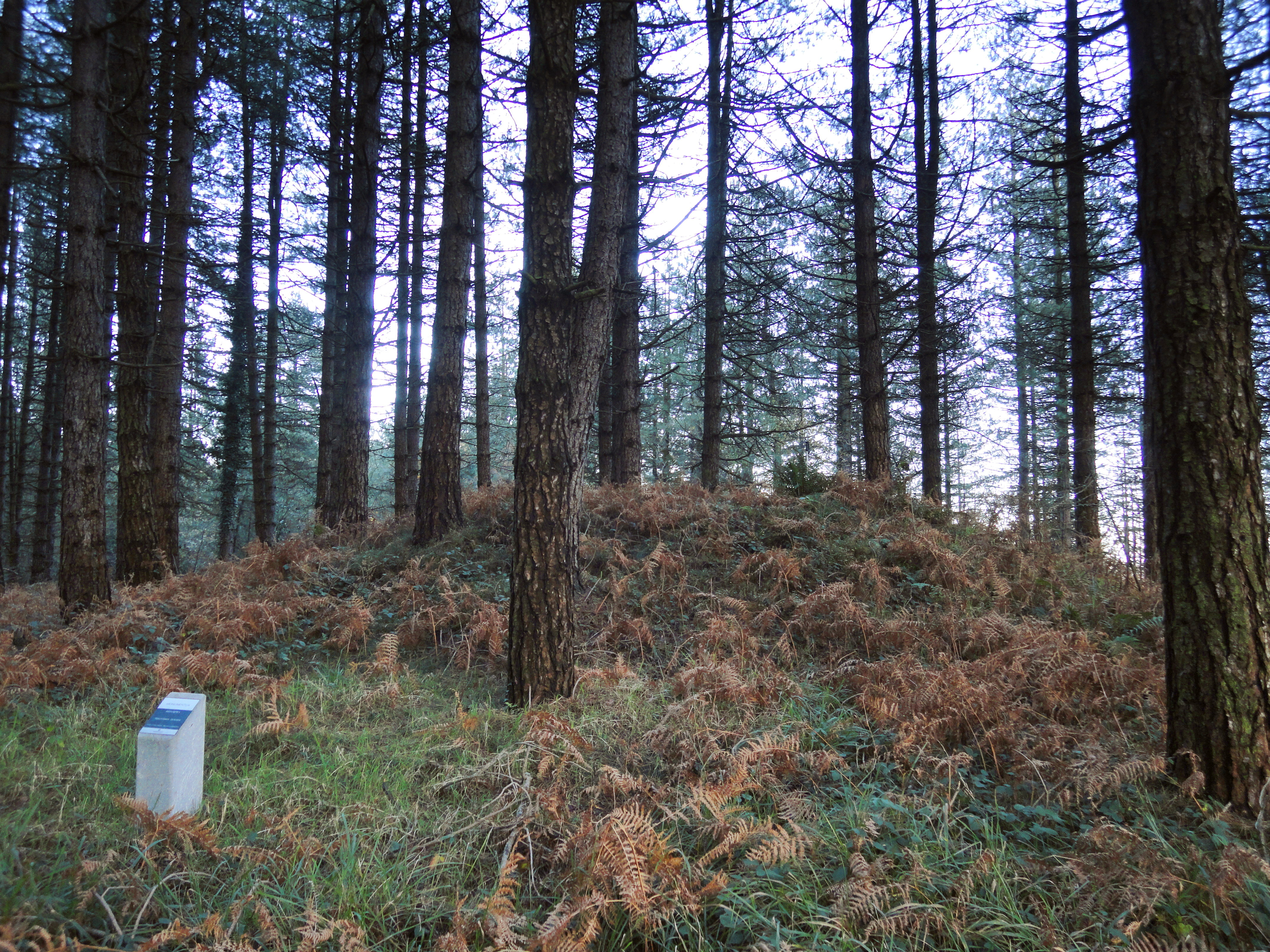 Bidaarte I trikuharria